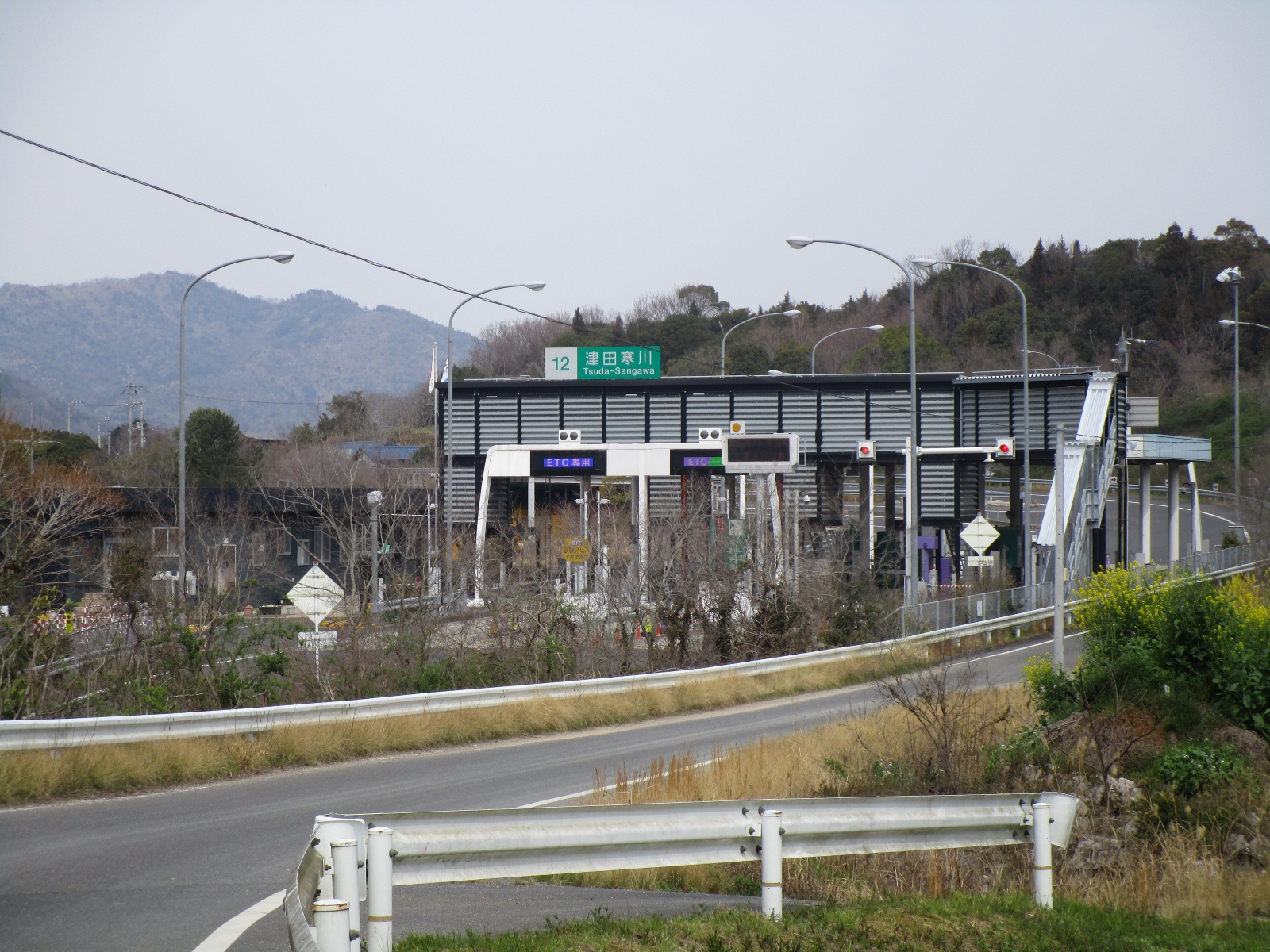 津田寒川インターチェンジ料金所